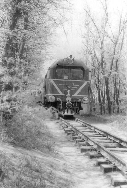 tu2-206